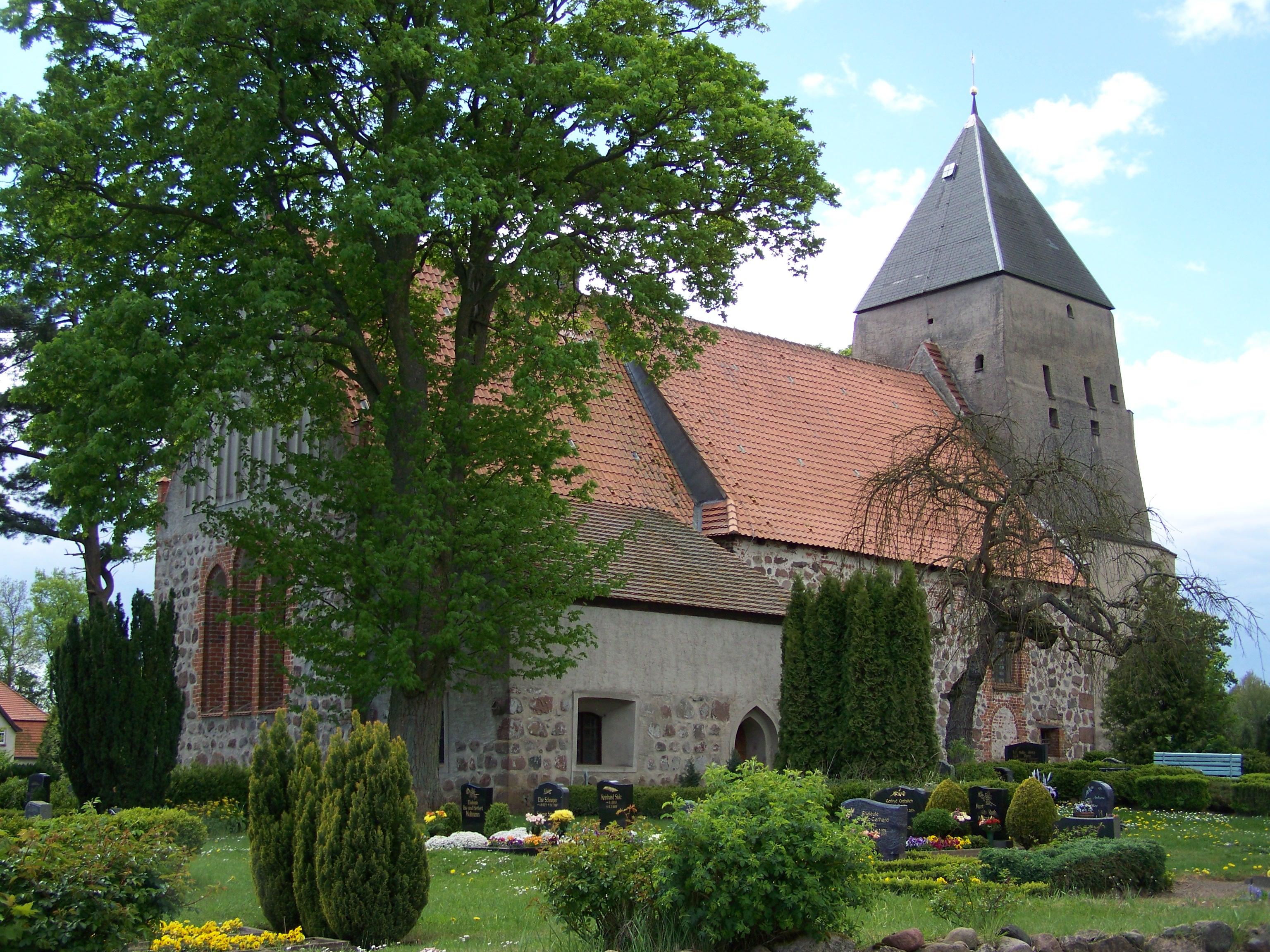 Kirche in Rakow, Vorpommern (2009-05-13)